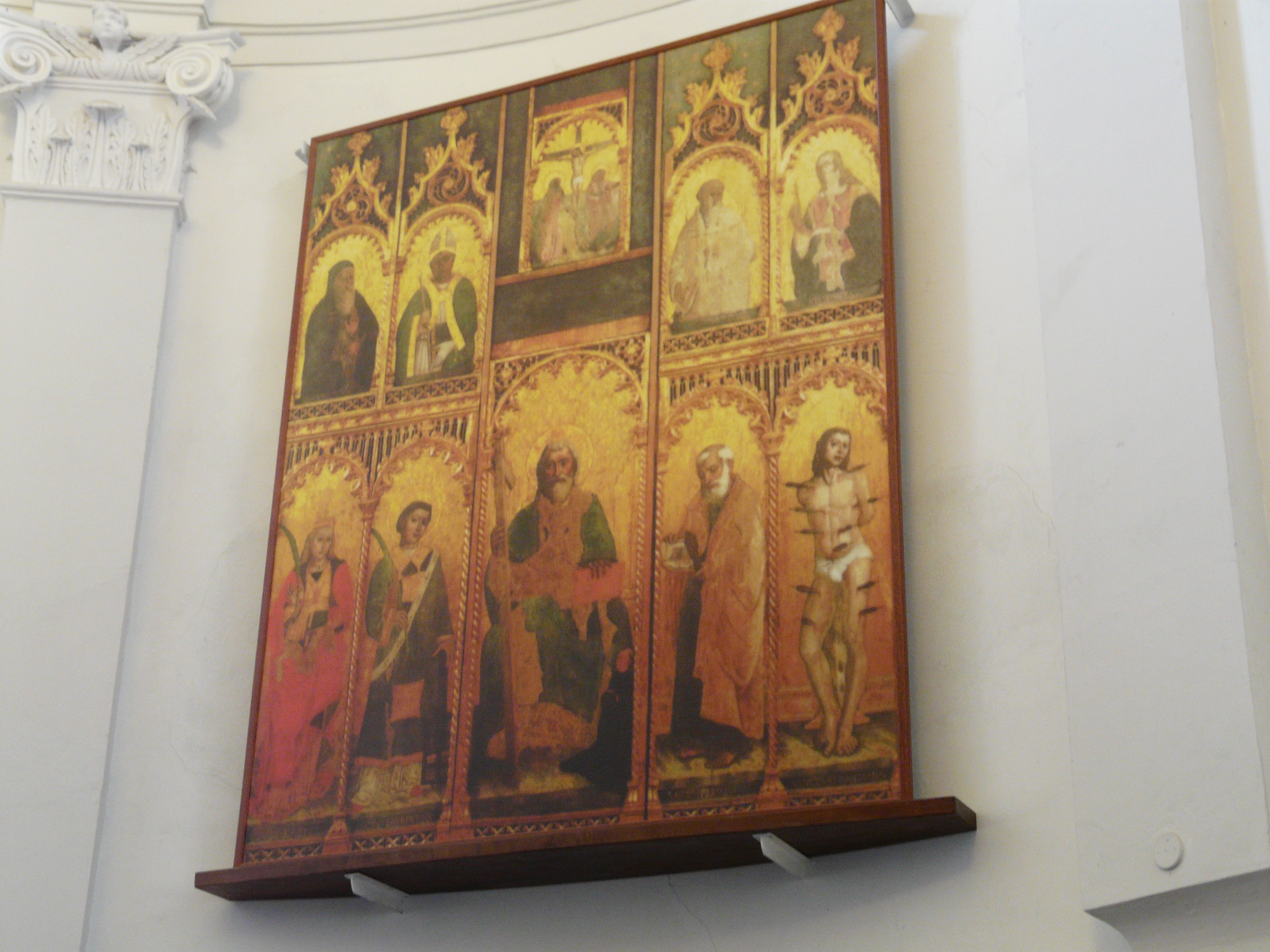 Polittico di Sant'Andrea, Abbazia di Borzone, Comune di Borzonasca, Liguria, Italia